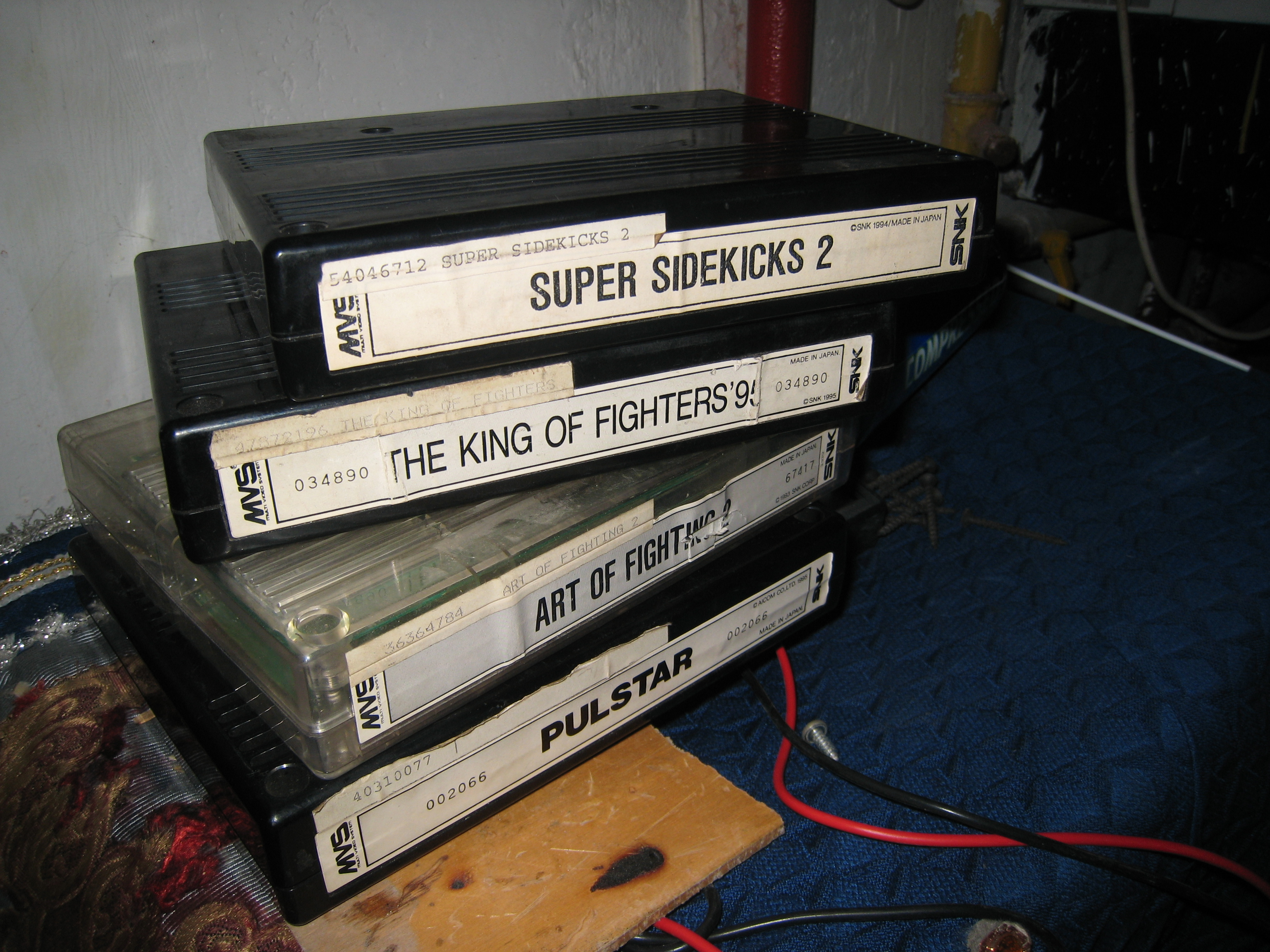 zawierały w sobie kartę graficzną i dźwiękową. No i scalak z grą :)